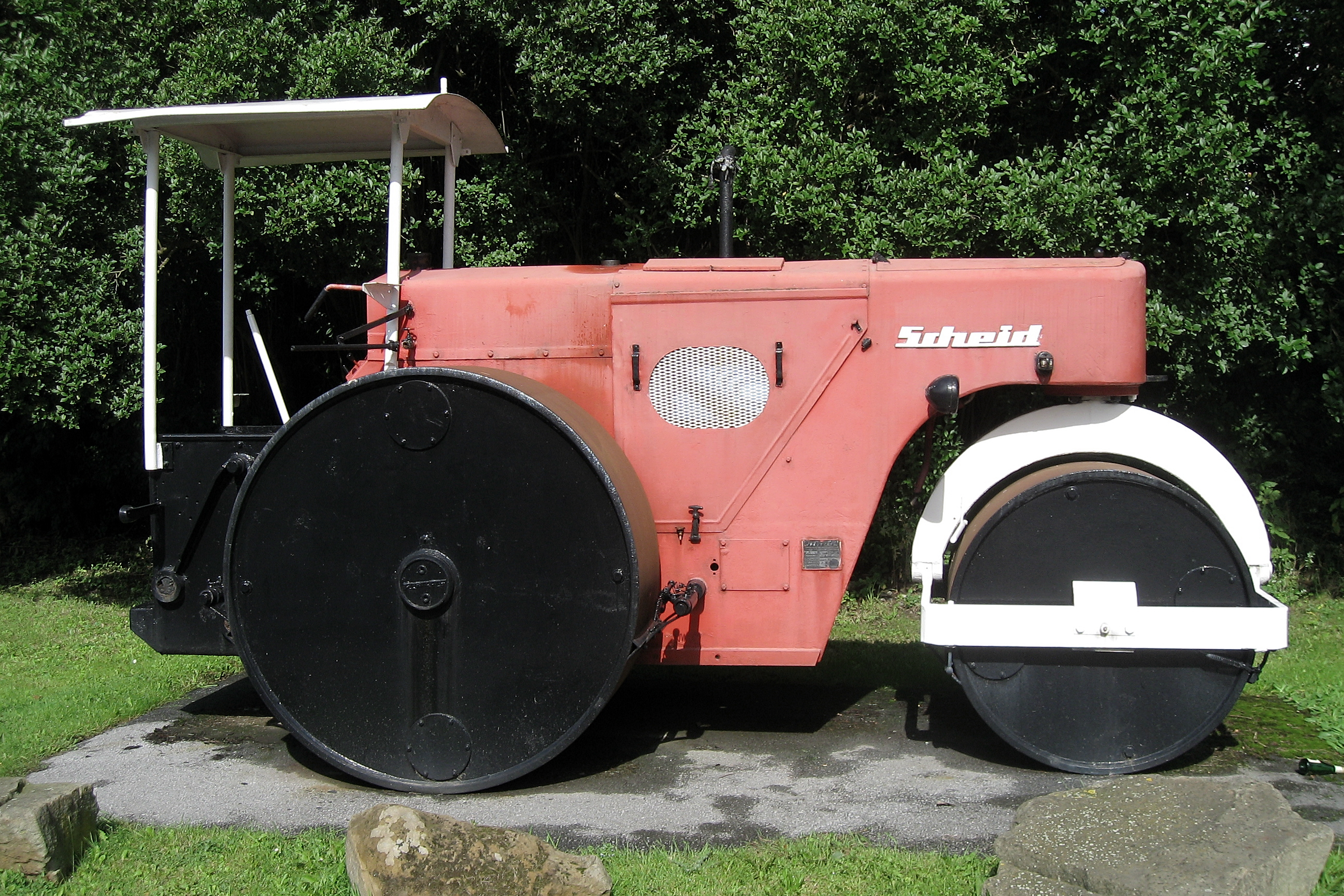 Scheid Dieselwalze am Betriebshof der Stadtwerke Dortmund Scheid Maschinenfabrik GmbH Limburg/Lahn Baujahr 1964 Fahrgestell Nr. 1138 Baumuster 159 1311138 zul. Gesamtgewicht für den Straßenverkehr 17.000 Kg